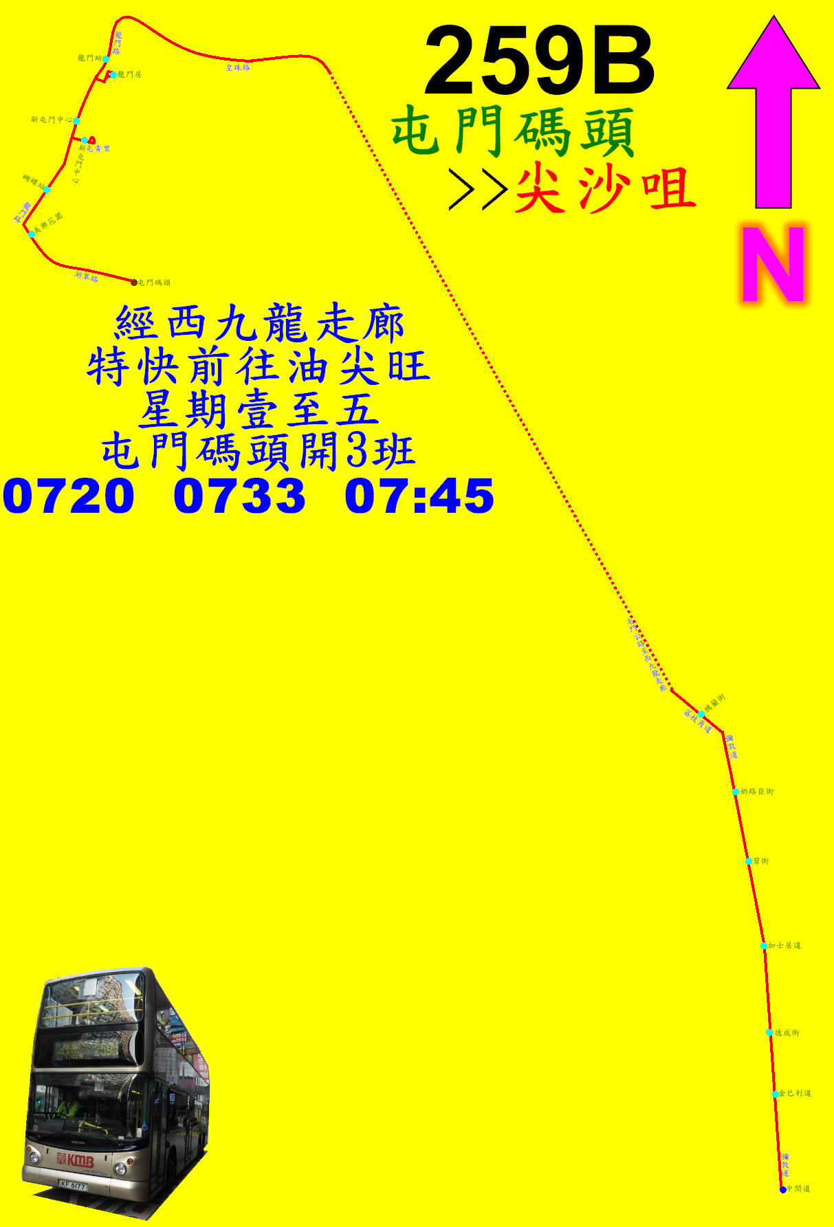 中文（香港）: 九巴259B線(九龍方向)的走線圖